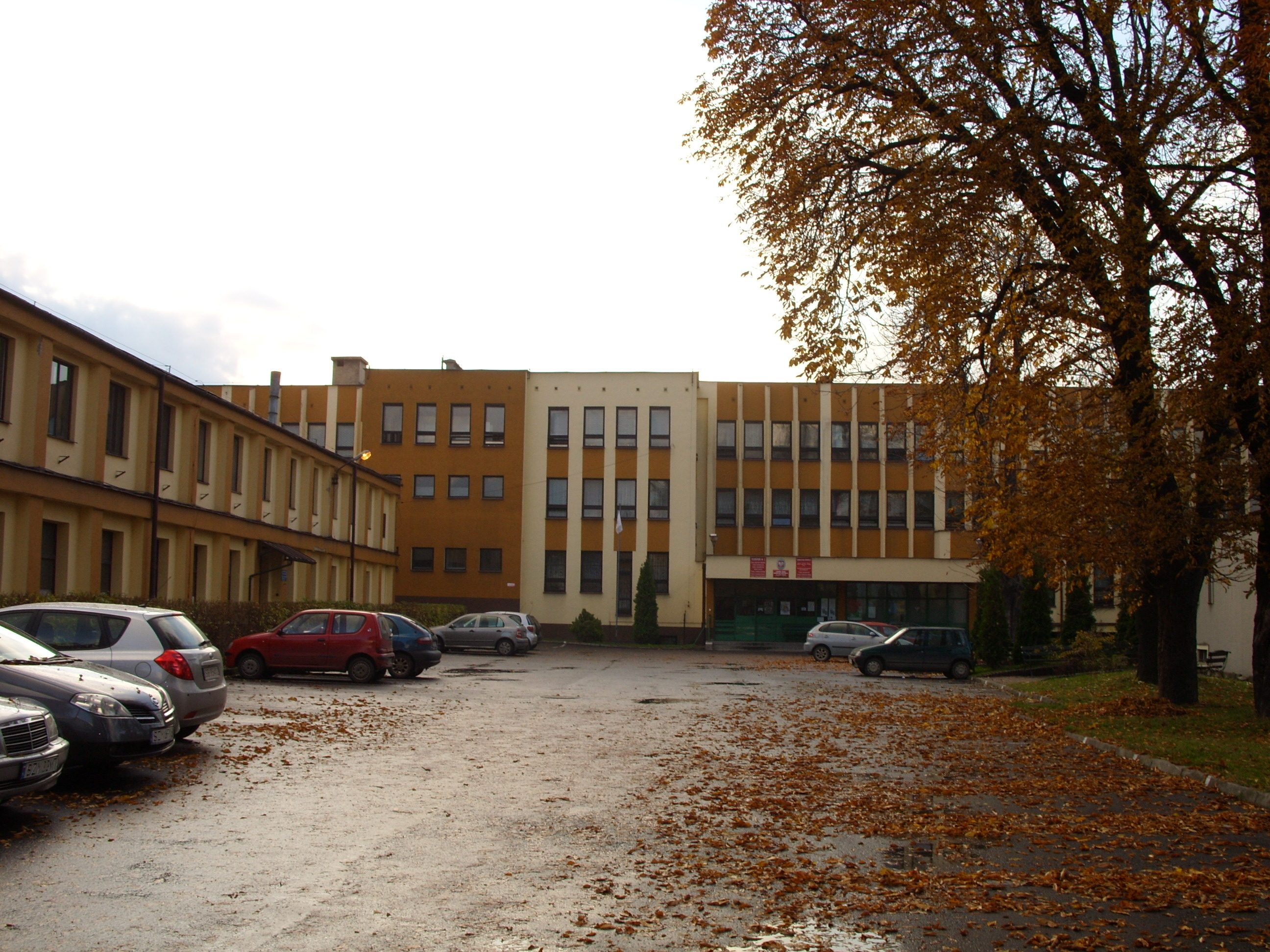 Zespół Szkół Budowlano-Drzewnych